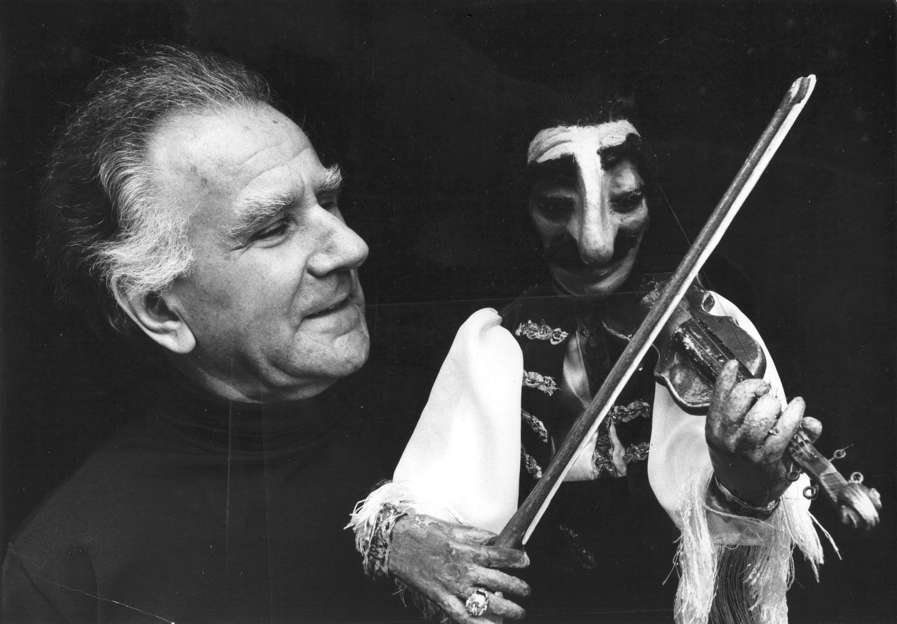 Porträt von Rolf Trexler